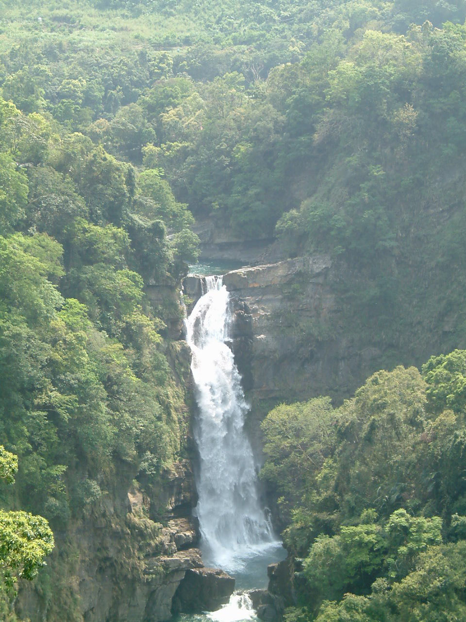 小烏來瀑布，位於台灣桃園縣復興鄉，落差約60公尺。